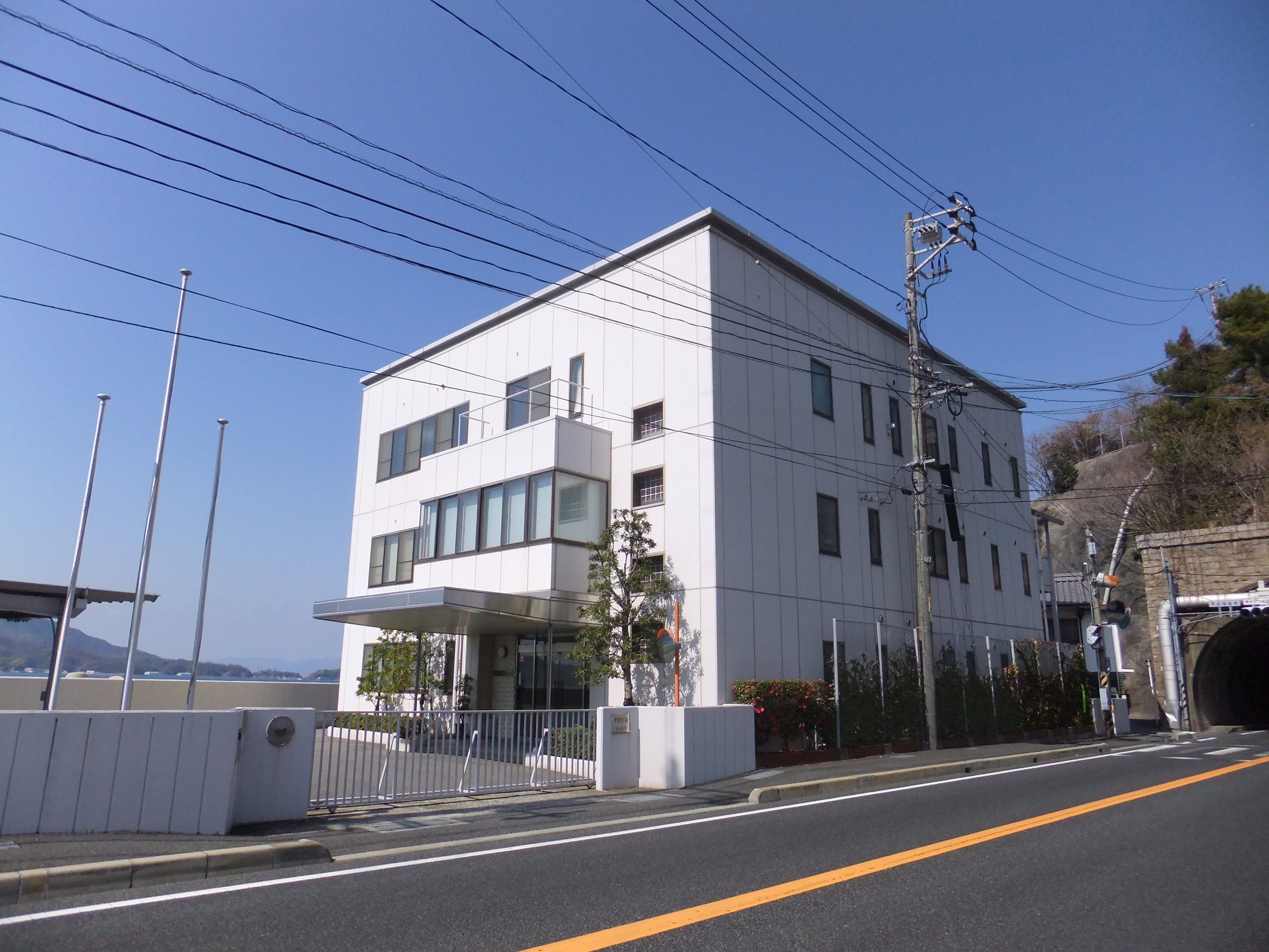 中国火薬本社